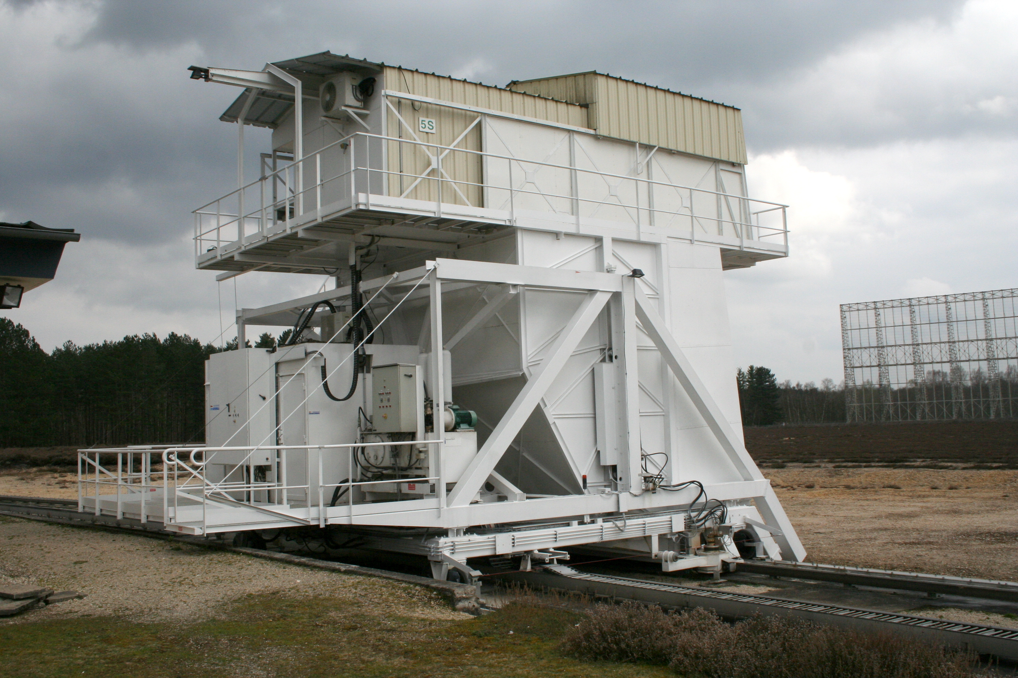 Vue du chariot focal du grand radiotélescope de Nançay